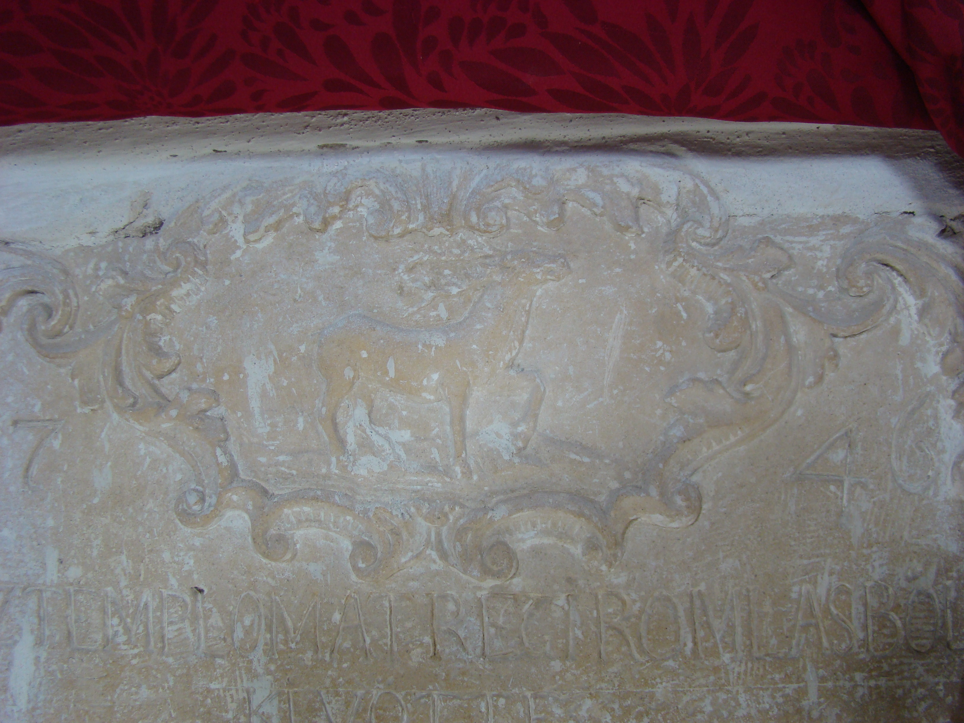 Biserica reformată din Boteni, județul Cluj